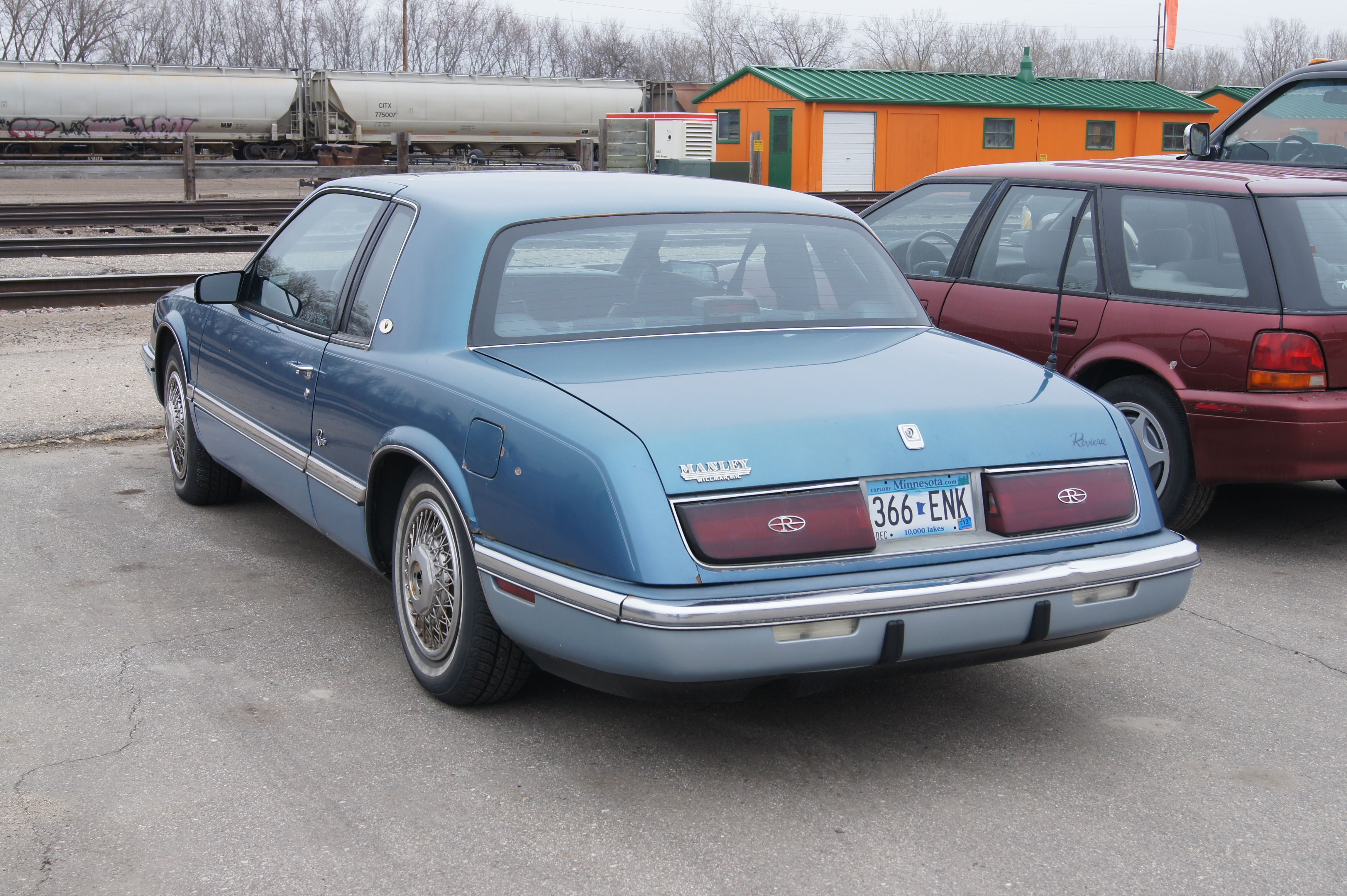 89 Buick Riviera